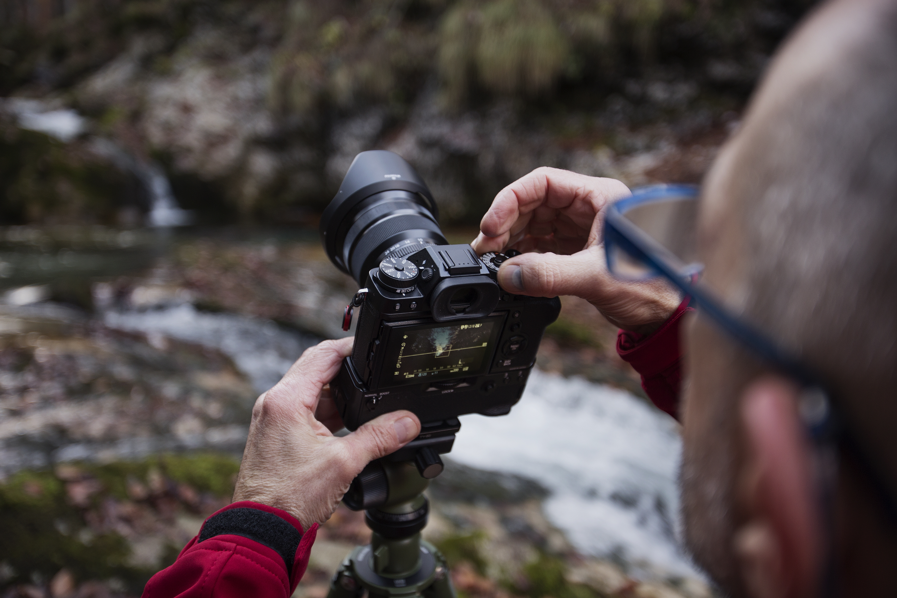 Татарча/tatarça: Фотограф эшчэнчелеге